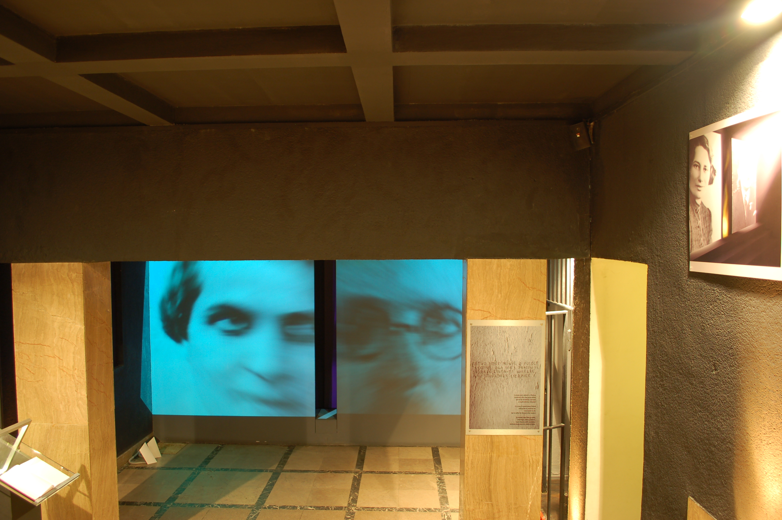 Mausoleum of Struggle and Martyrdom, Warsaw